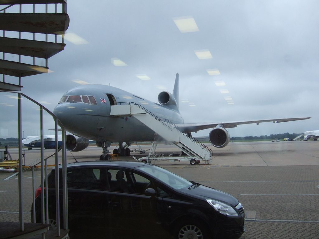 ブライズノートン基地、オックスフォード